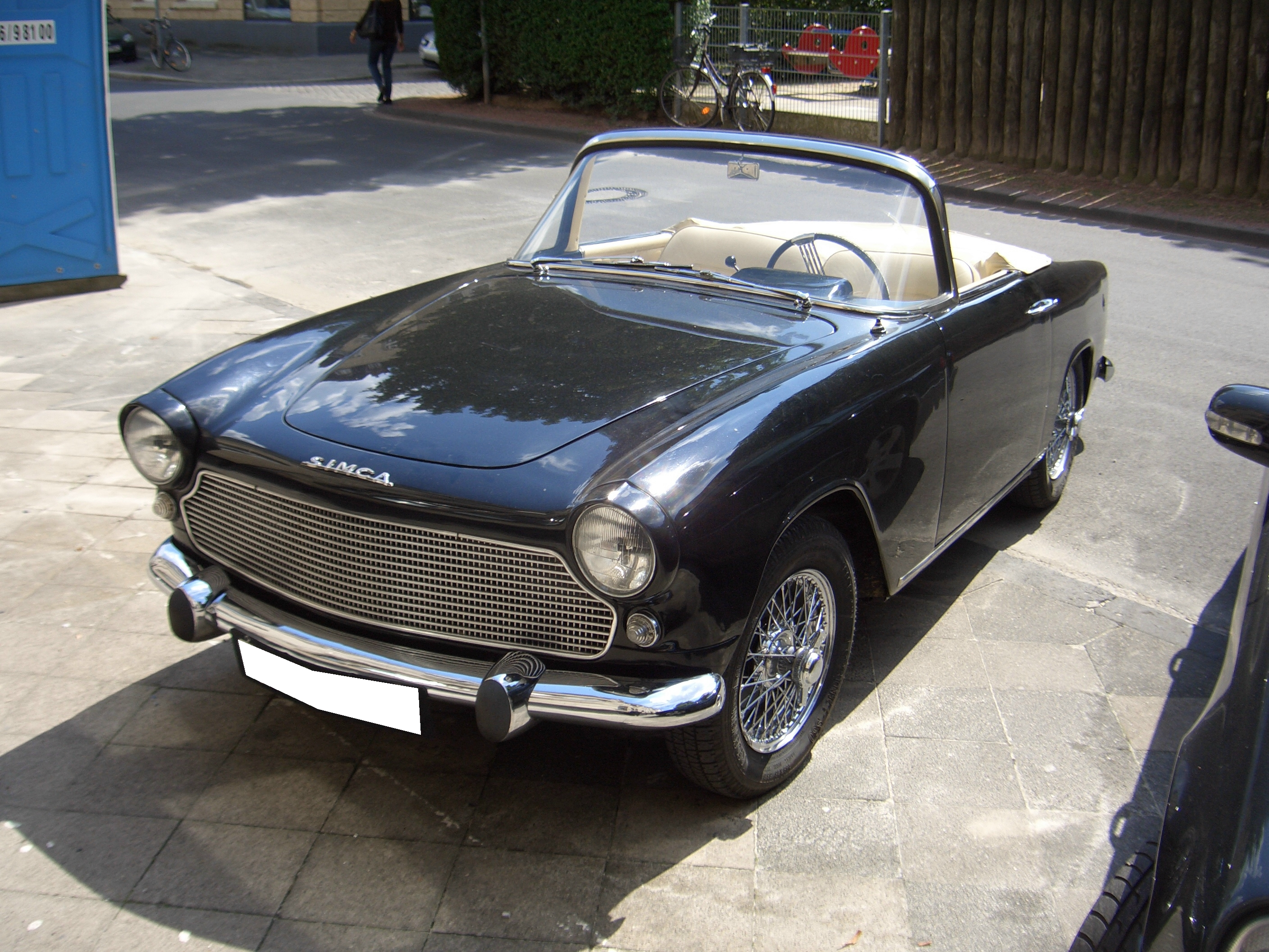 Simca Aronde P60 Océane, 1960, seen in Duesseldorf, Germany